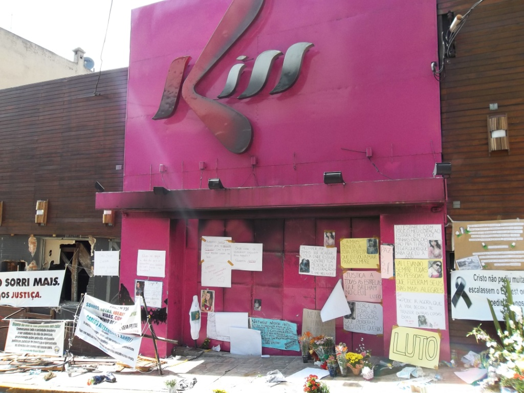 Boate que sofreu incêndio no município de Santa Maria - RS.